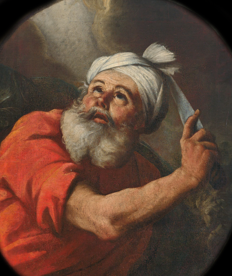 Anonym: "Abraham erhebt das Messer (Opferung Isaaks)", um1700, Öl auf Leinwand, 87 x 74 cm